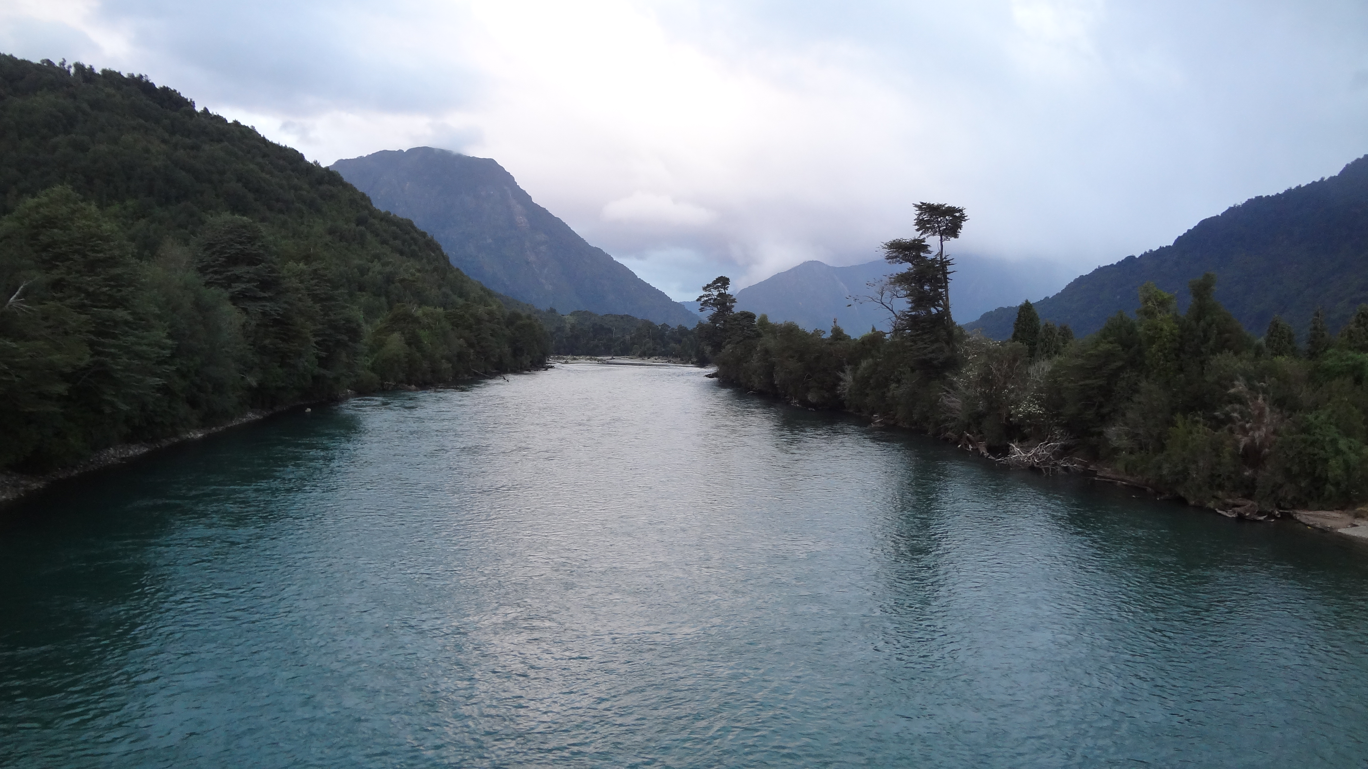 Fotografias del sur de Chile, XI Región